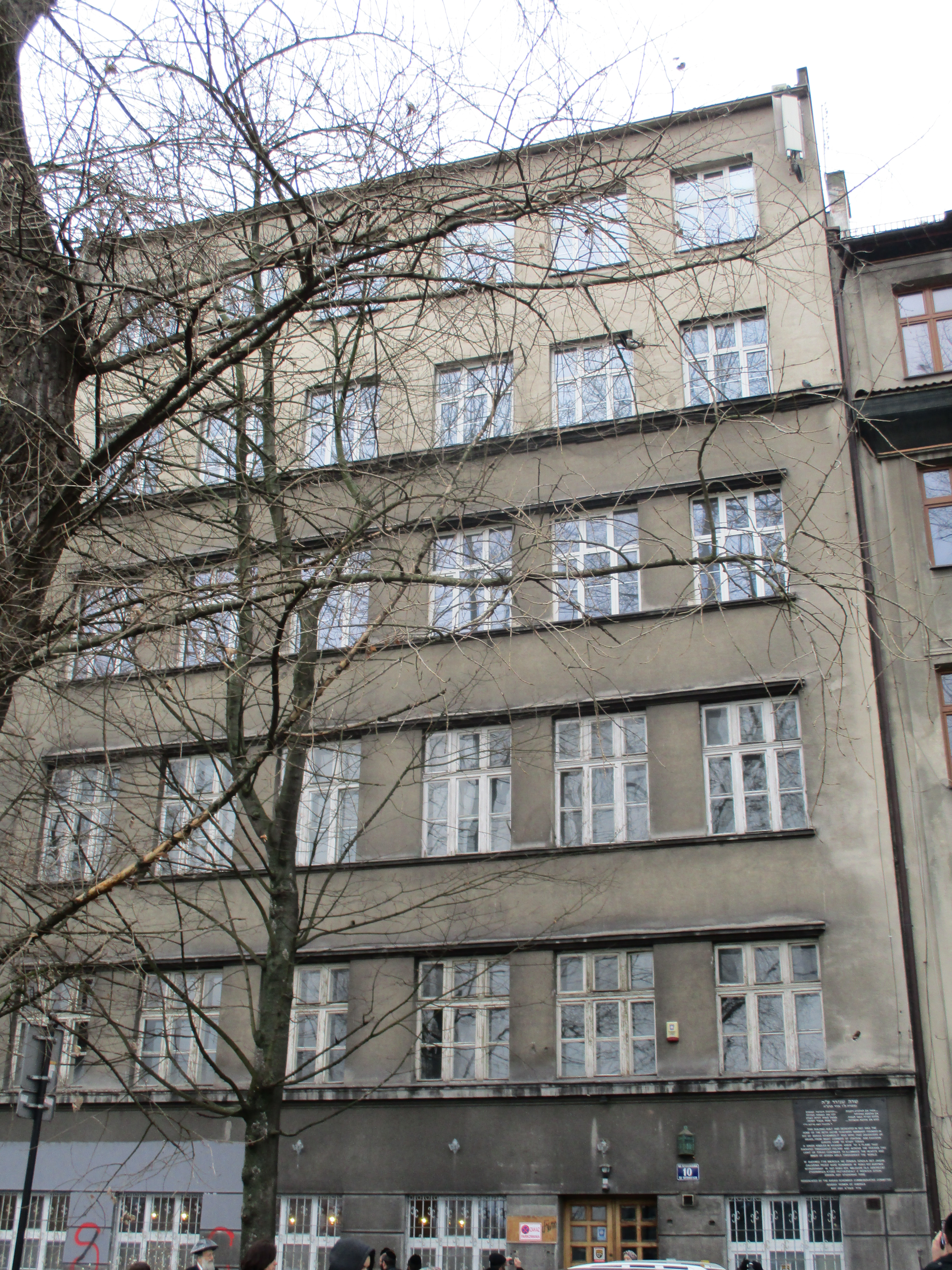 בית ספר "בית יעקב" הראשון, קרקוב (1).jpg